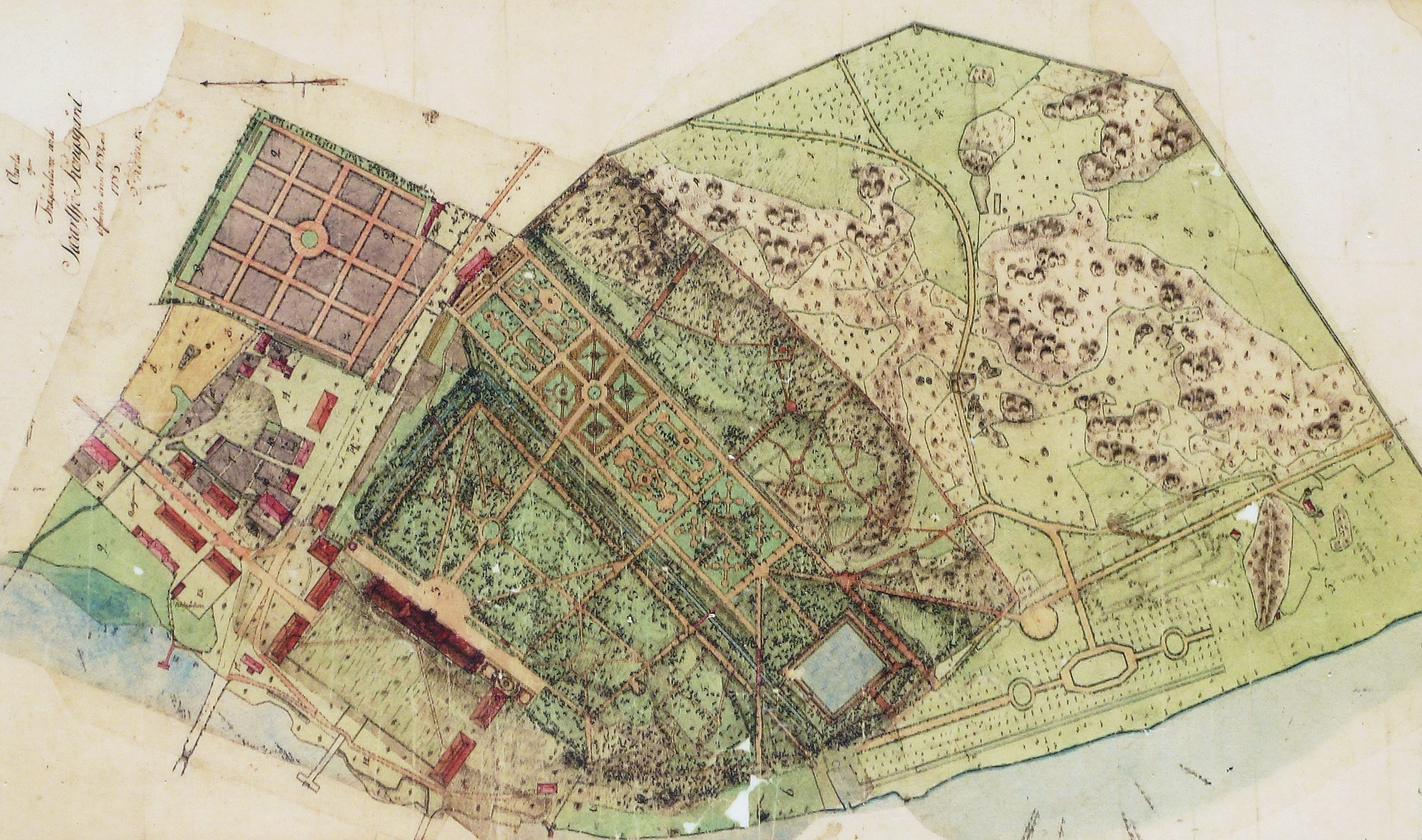 Svartsjö slottspark 1785